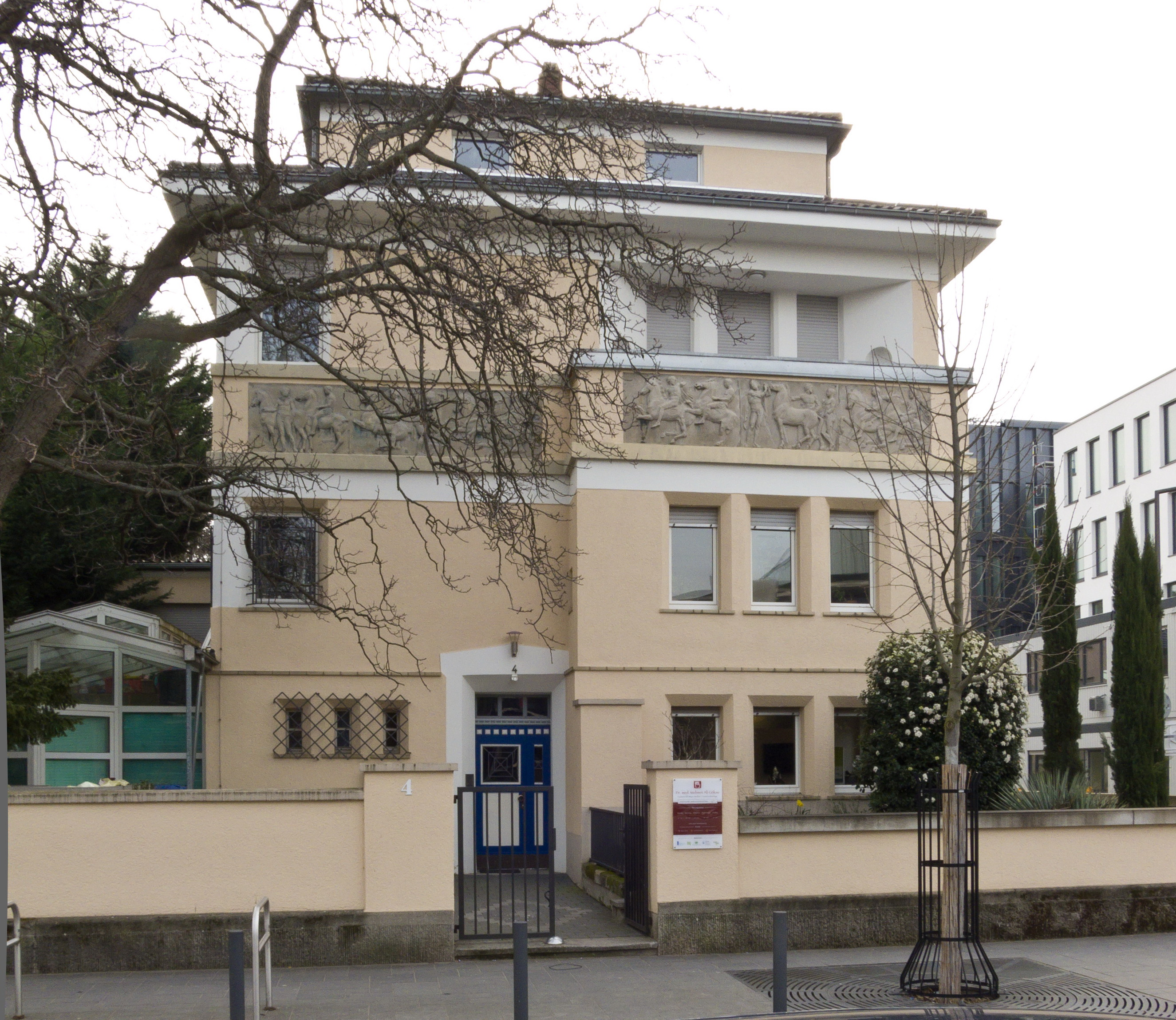 Worms, Villa, Rathenaustraße 4, Walmdach-Villa, sachlich gehaltene Jugendstil-Motive, umlaufender Fries, 1913